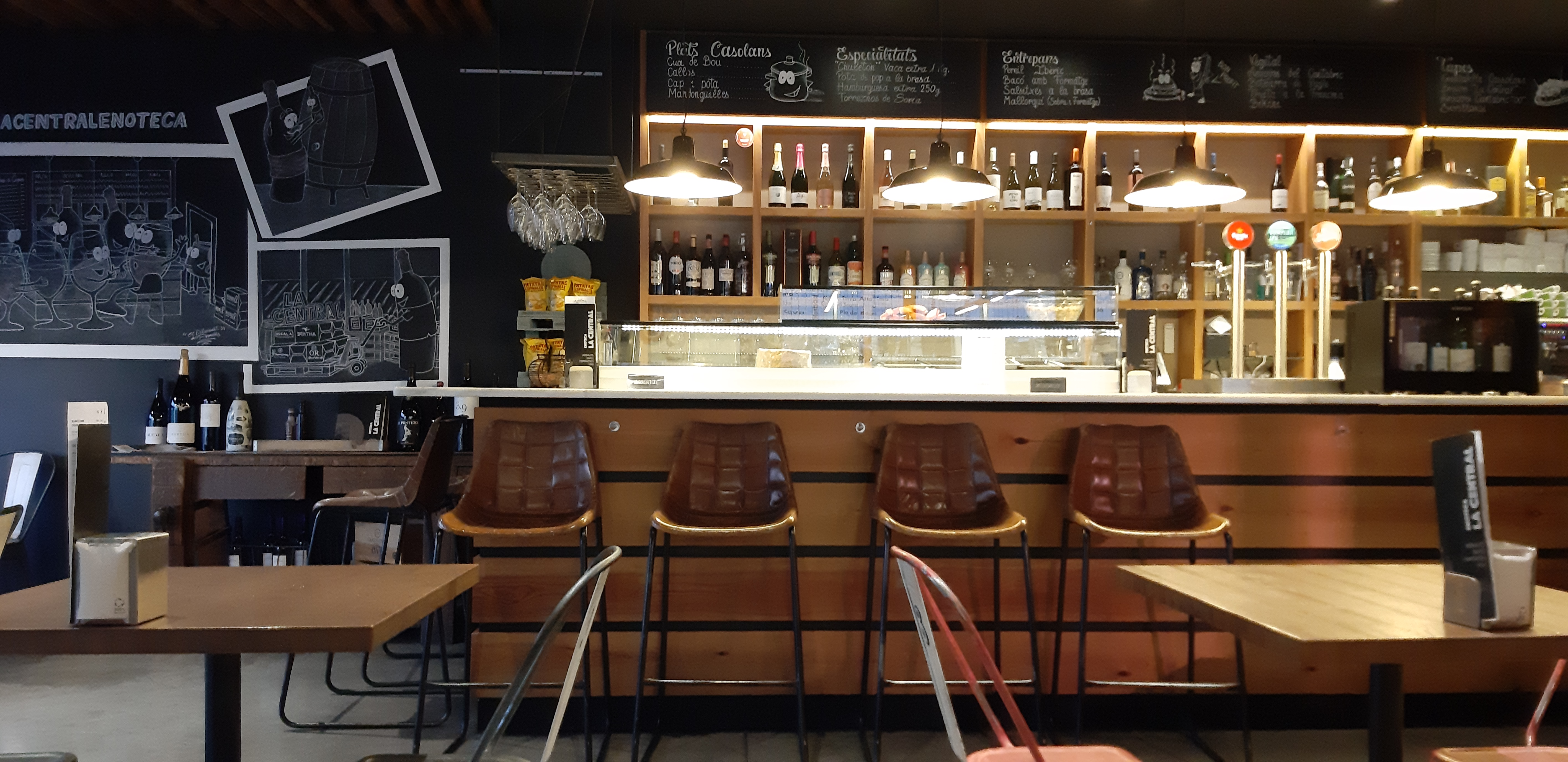 Degut a la pandèmia del coronavirus, moltes vinateries van adoptar mesures perquè les persones clients no estiguéssin a les barres. Una d'elles, col·locar els taburets en una posició diferent a la normal.